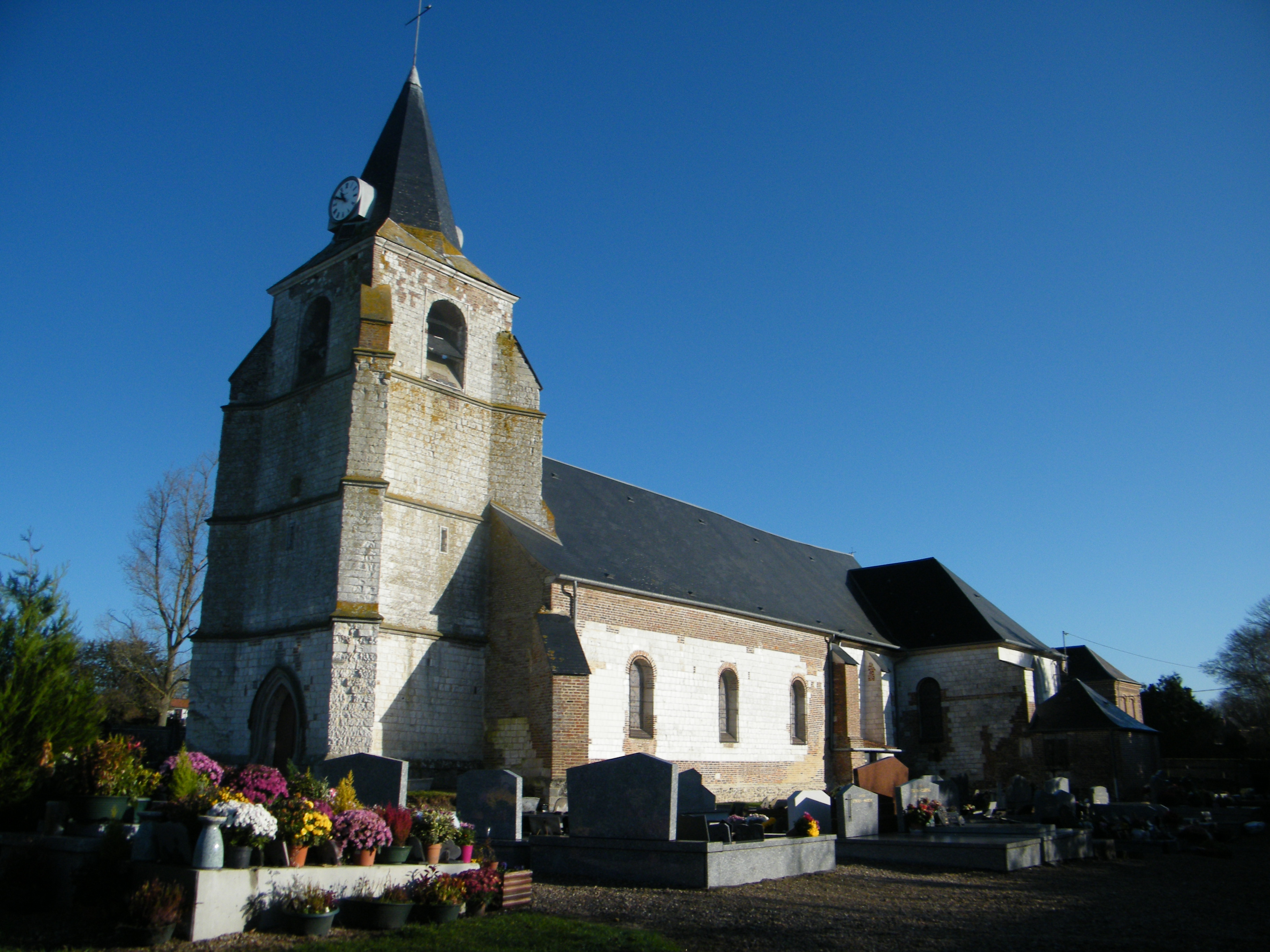 Forest-Montiers, église Saint-Martin, côté sud.